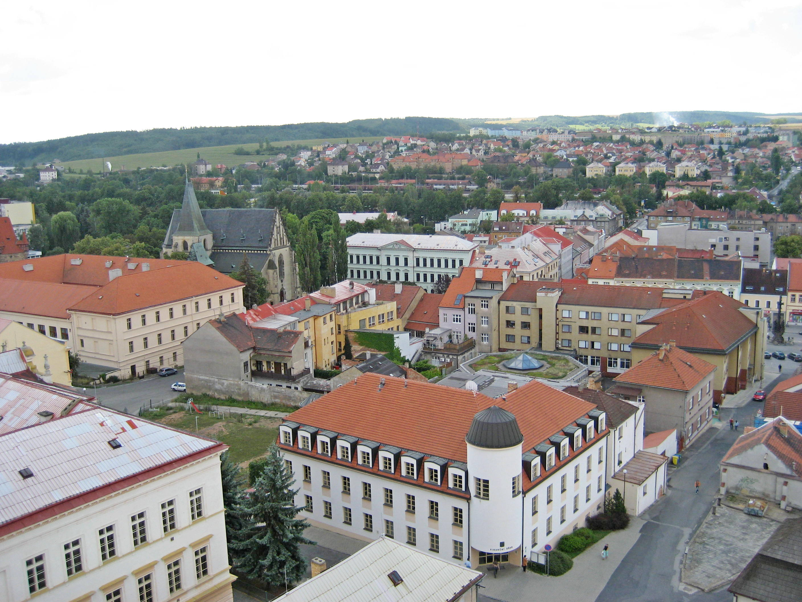 Centrální část města Rakovník